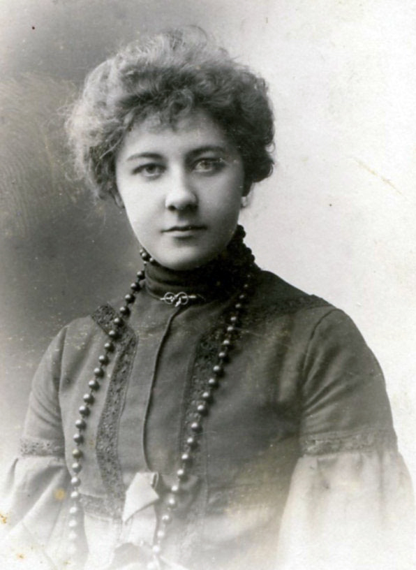 Грінченко Анастасія у Львові